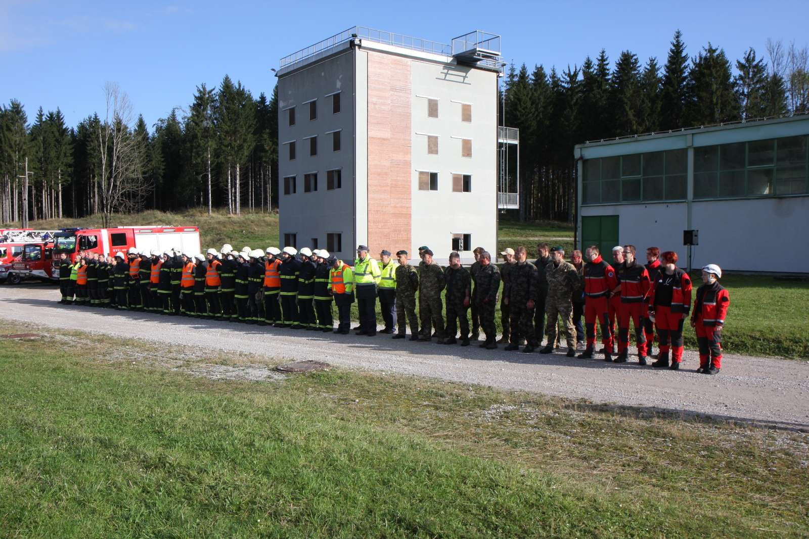 Gasilsko-reševalna vaja v Vojaškem objektu Škrilj.